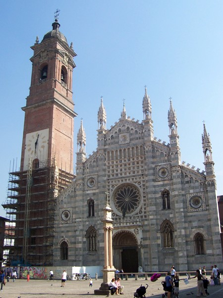 La facciata del Duomo di Monza, progettata alla metà del XIV secolo da Matteo da Campione.